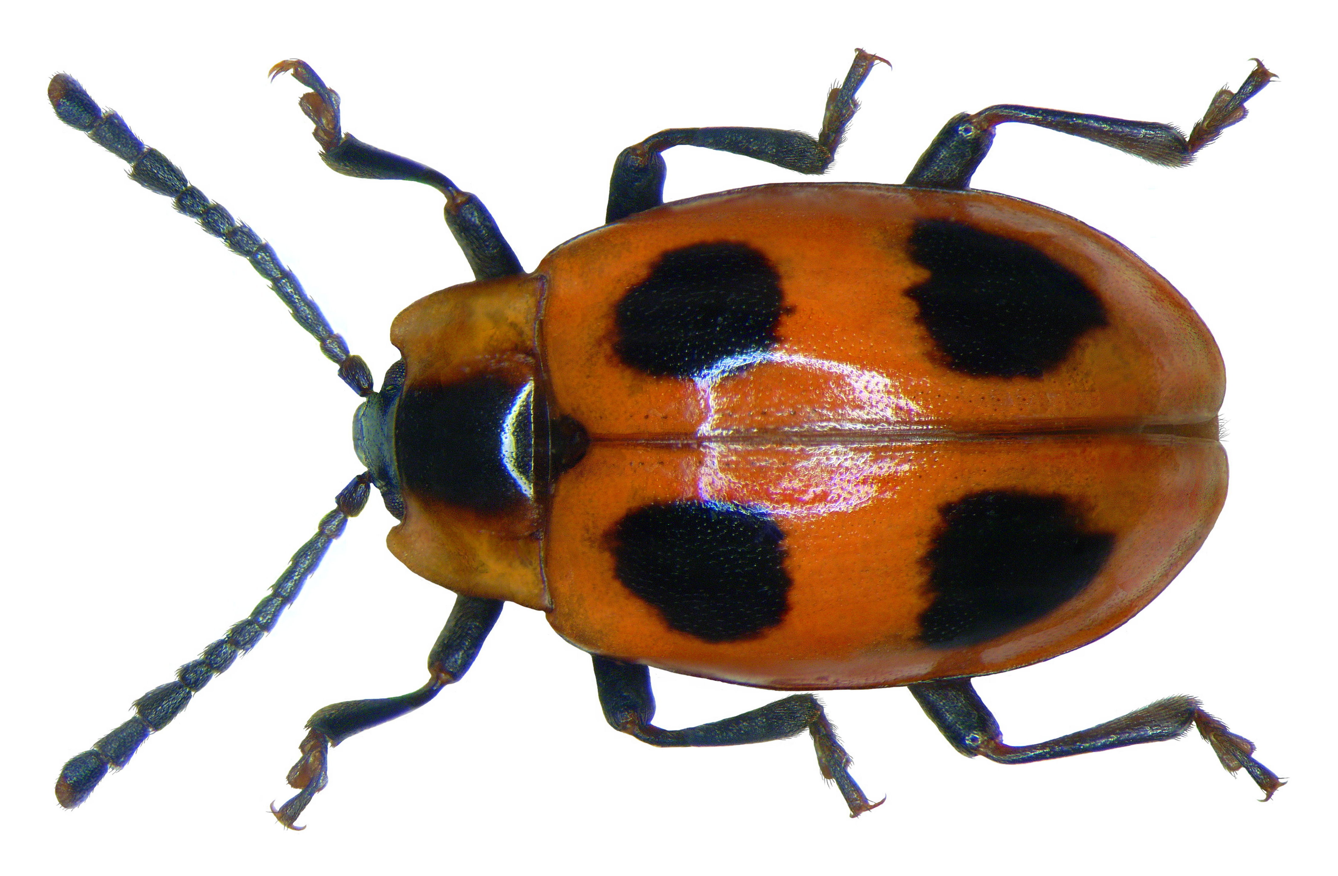 Endomychus coccineus (Linné, 1758) Familie: Endomychidae Grösse: 4-6 mm Verbreitung: Europa Ökologie: an Pilzen und verpilztem Holz Fundort: Germania, Oberfranken, Bad Steben leg.det. U.Schmidt, 2000 Foto: U.Schmidt, 2008